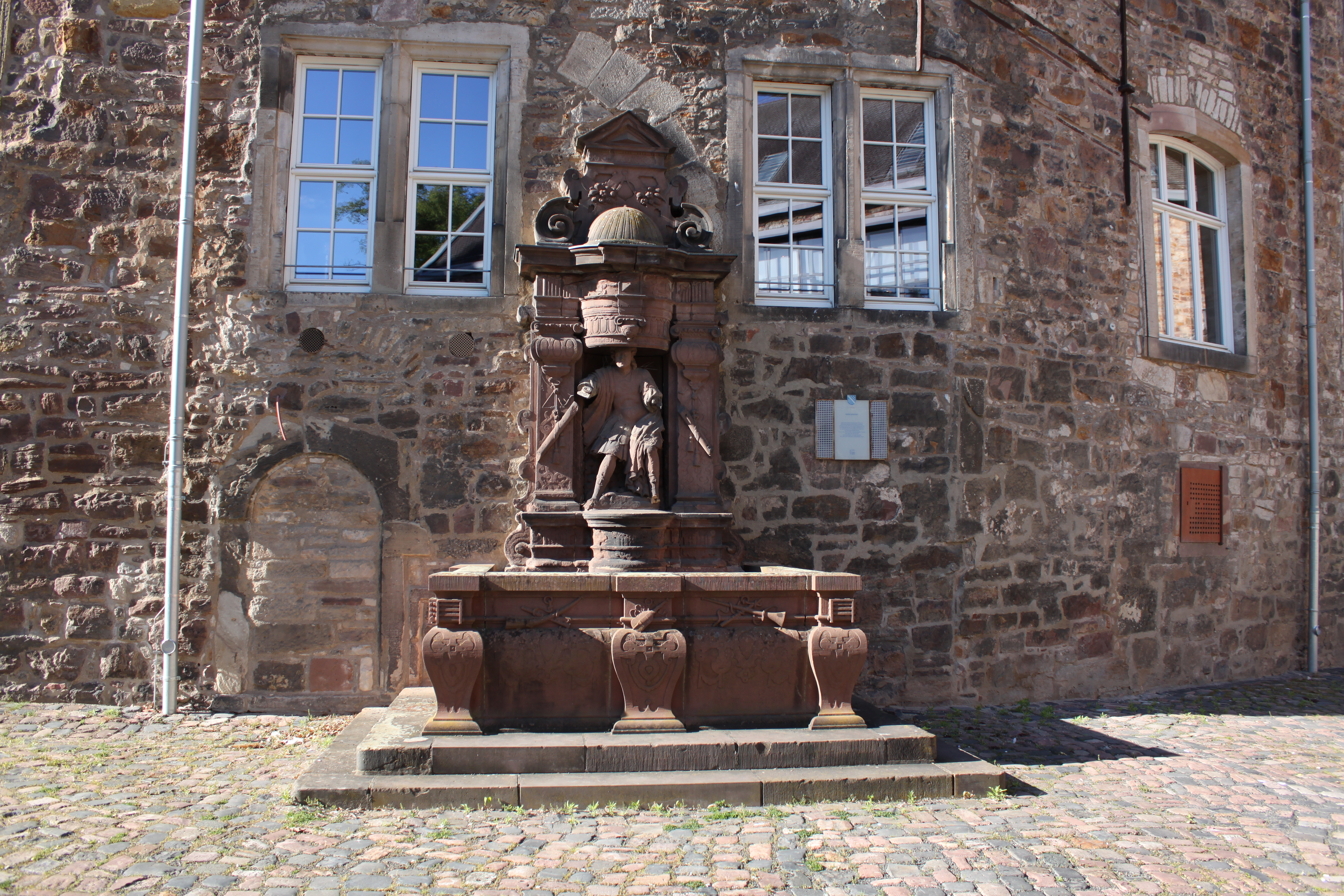 Apollobrunnen Kassel (2020)